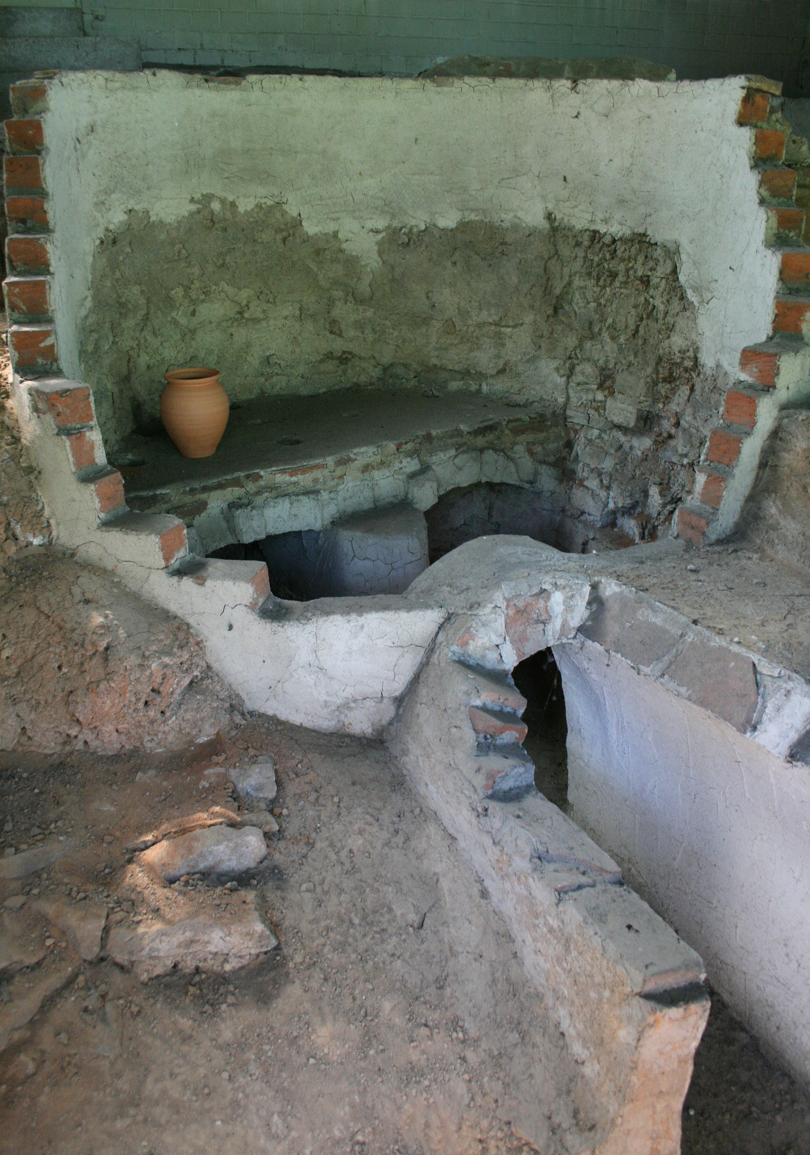 Restaurierter römischer Töpferofen in Frankfurt-Heddernheim (Römerstadt Nida). Der Ofen mit rundem Grundriss. Mit freundlicher Genehmigung des Archäologischen Museums Frankfurt.